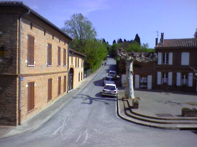 Photo du village de Fourquevaux